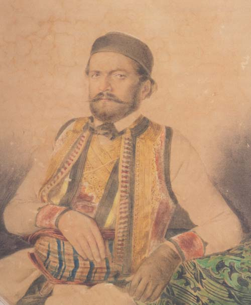 Портрет Негоша, выполненный Анастасом Йовановичем в 1847 году